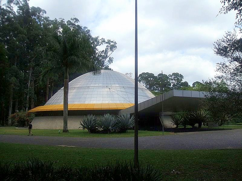 Planetário do Parque do Ibirapuera, São Paulo, Brasil